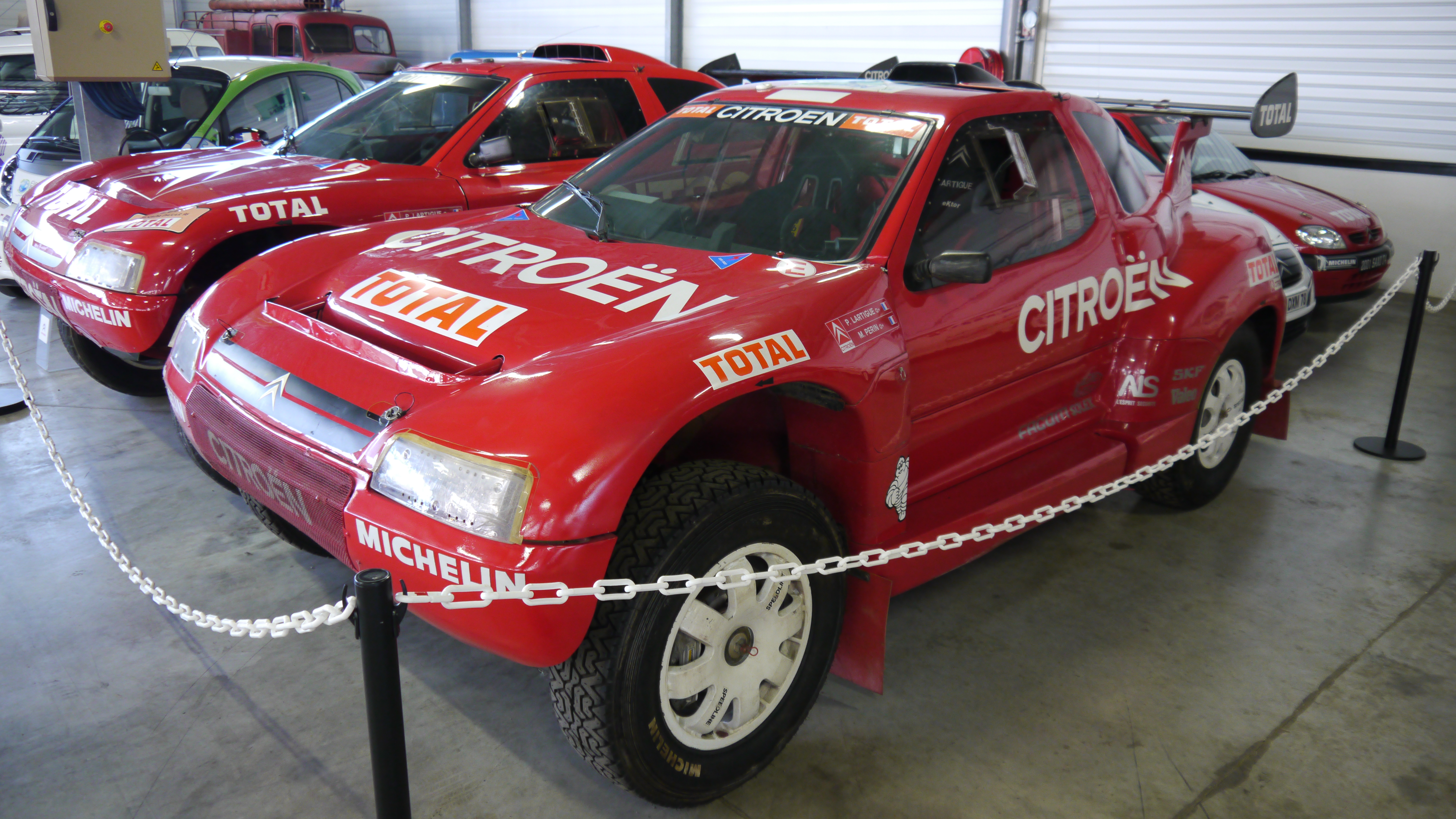 Conservatoire Citroen 181 Citroen ZX Rallye Raid